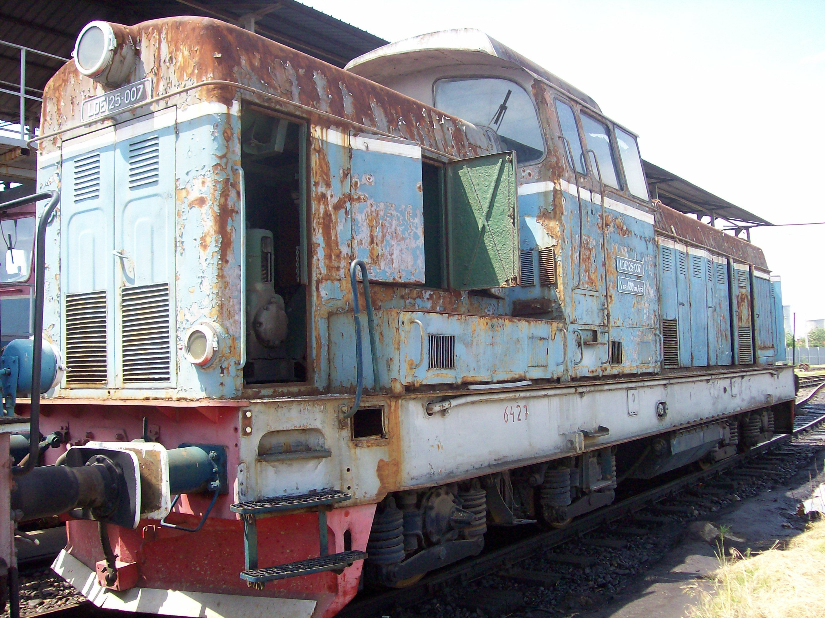 Locomotiva CFR clasa 69